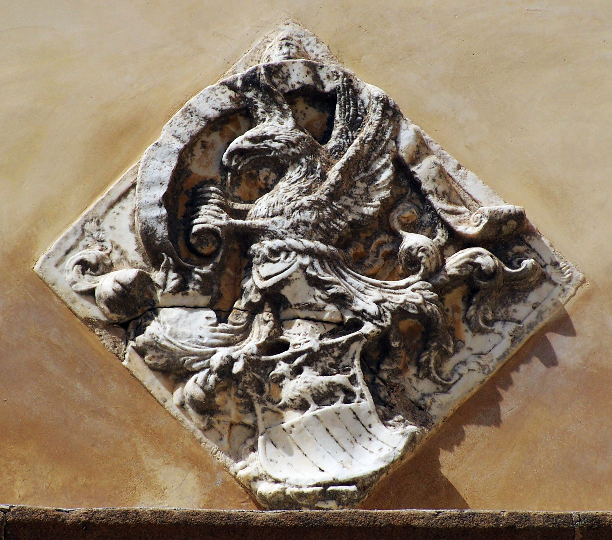 Autore foto: Peppe64/Giuseppe Grifeo; Stemma Grifeo, opera di Francesco Laurana - 1468 - Castello Grifeo, Partanna (Tp)